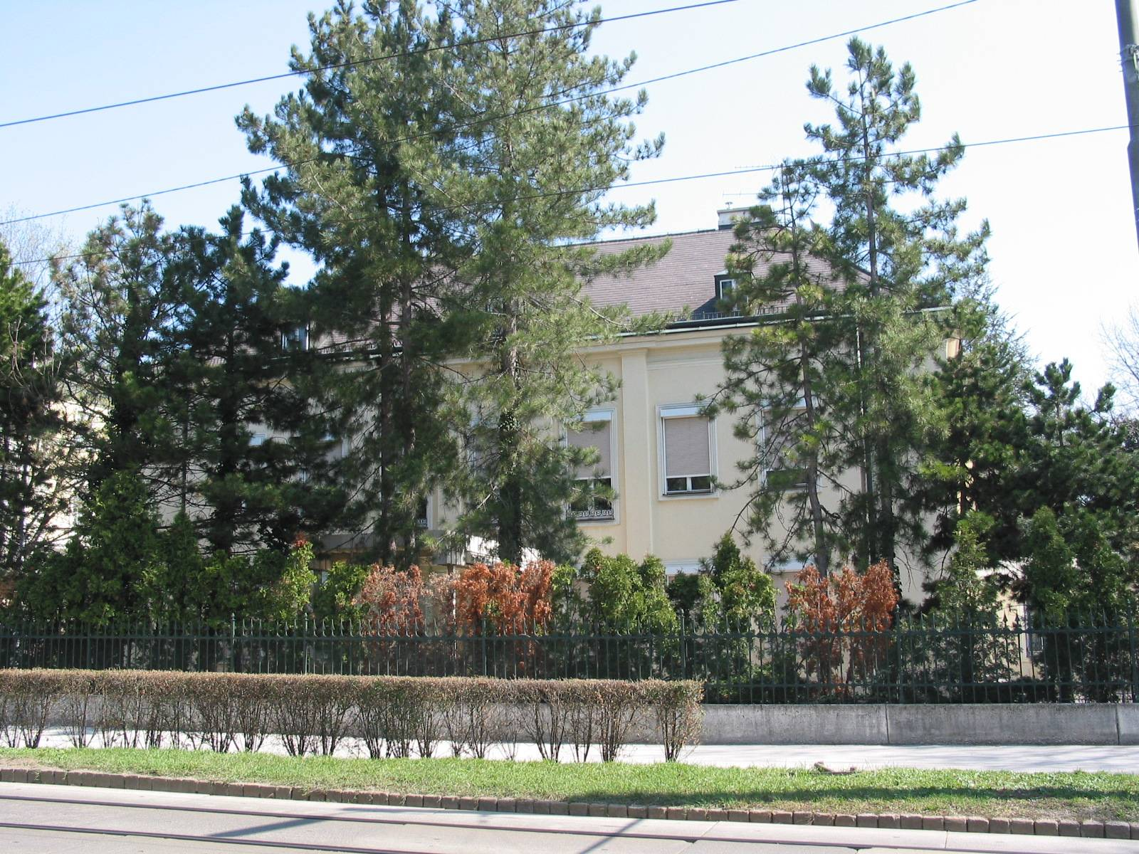 de: ehem. Villa des österr. Bundespräsidenten en: former mansion of the Autrian president